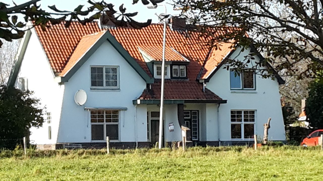 Ambtenaren woning in Osen. Bouwjaar waarschijnlijk rondom 1930.